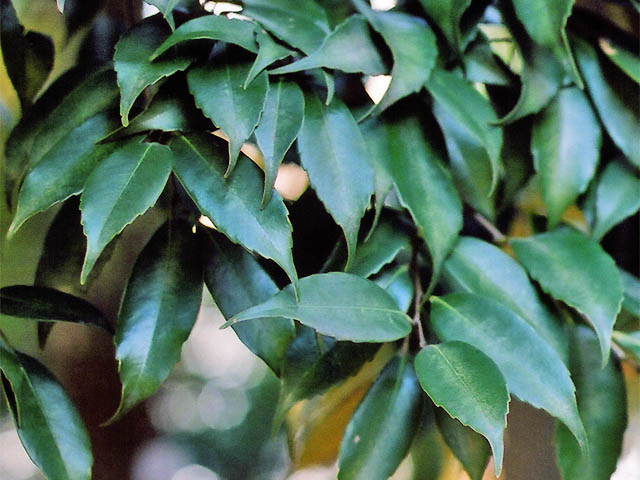 Castanopsis cuspidata var sieboldii, en Tokyo, enero de 2007. Foto por usario Inti-sol スダジイの葉。2007年1月投稿者が撮影